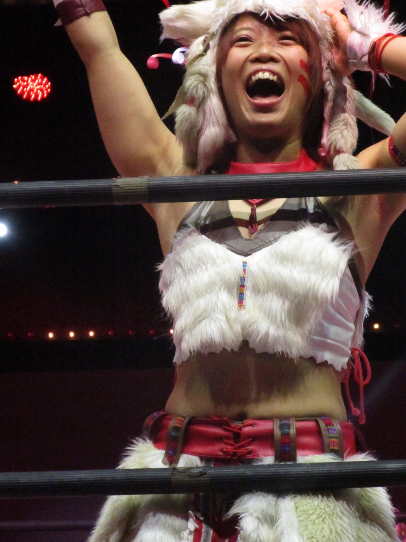 2018年10月13日・大阪